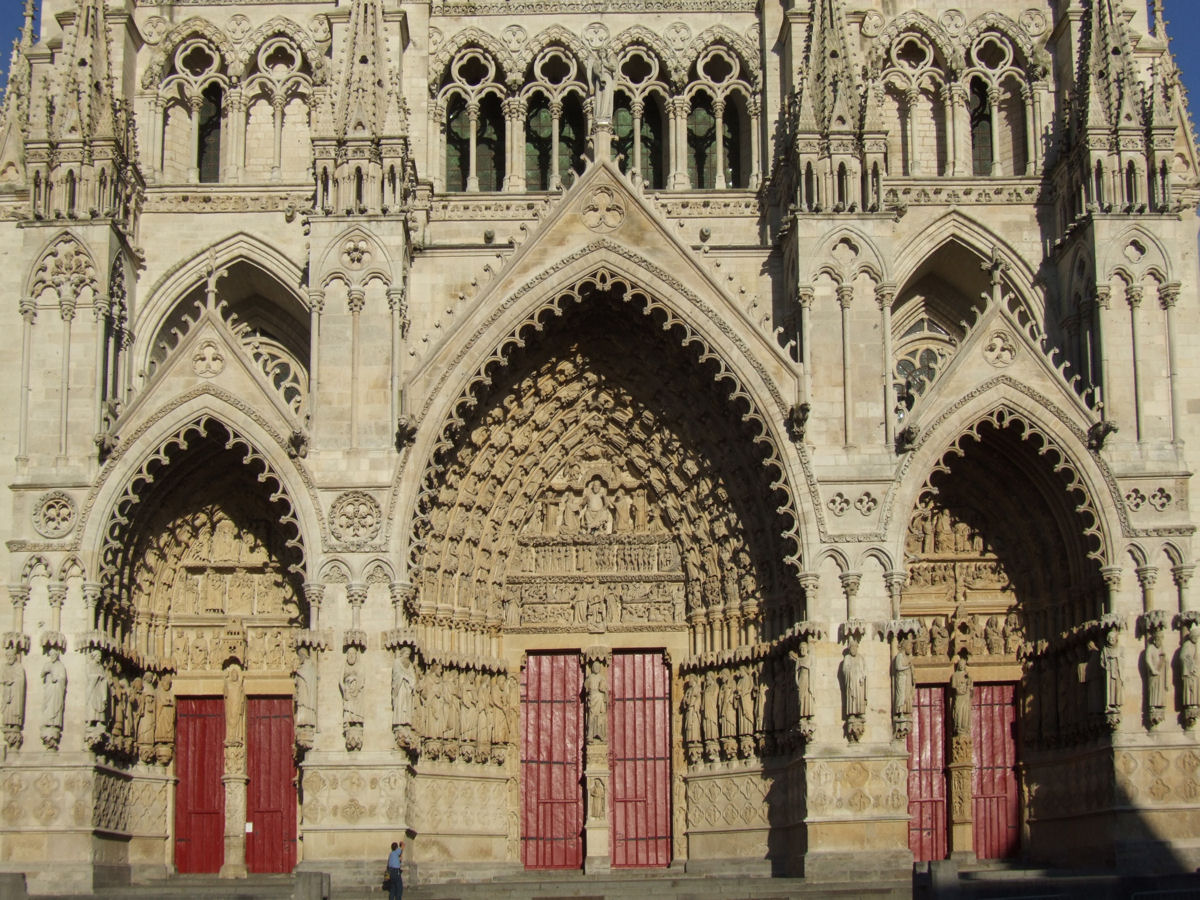 Amiens Cathedral (Cathédrale Notre-Dame d'Amiens), France